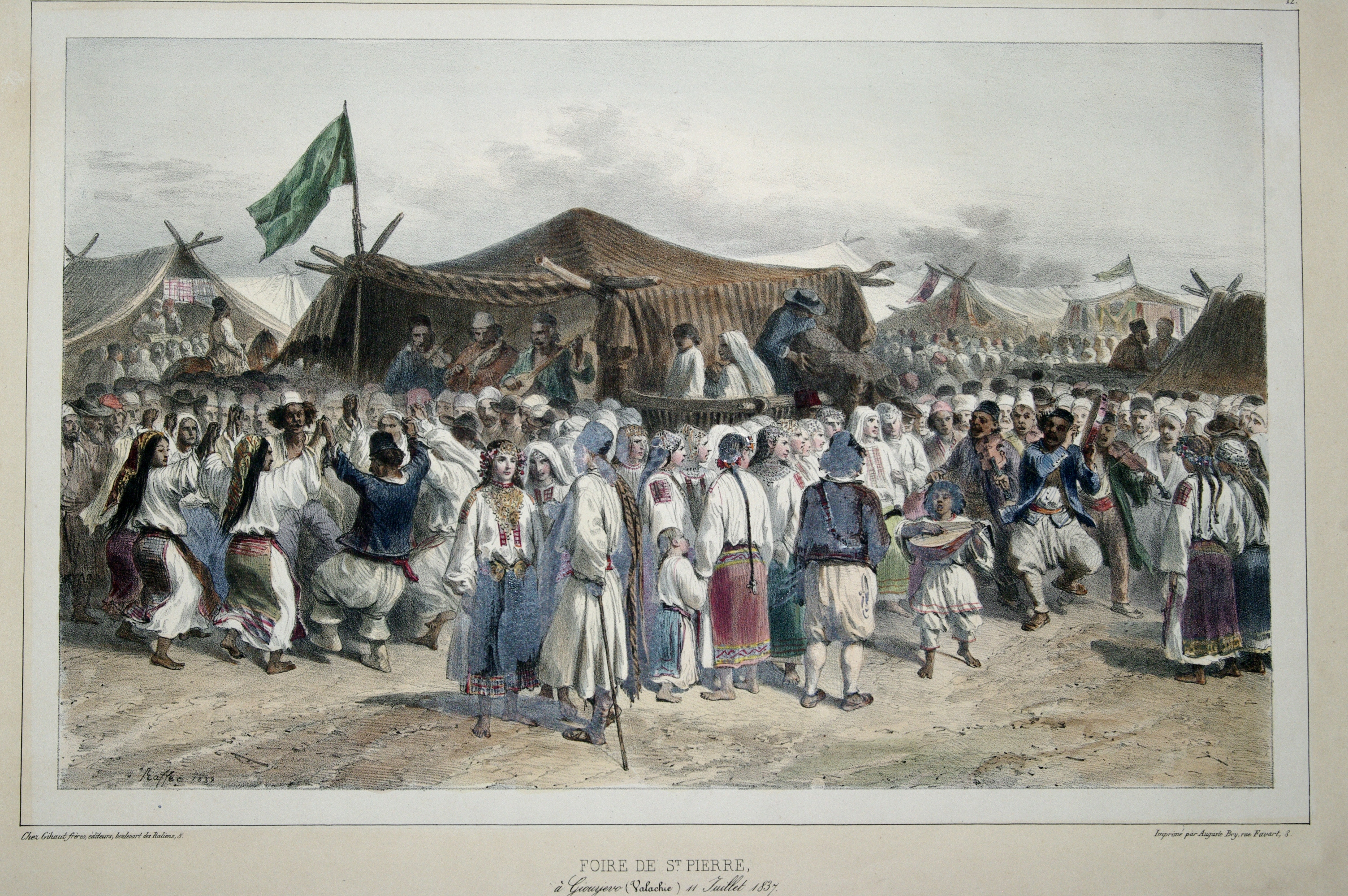 Foire de St. Pierre a Giourgevo (Valachie), 11 juillet 1837 L'espace laissé vide par des tentes élevées de tous côtés est rempli par une foule animée de curieux et de danseurs au milieu sur le premier plan un groupe de belles filles portant sur la chemise flottante le double tablier serré aux reins par une large agrafe de clinquant et dont les poitrines et les chevelures tressées sont ornées de sequins réunis en colliers ou retombant en grappes de la droite débouchent des musiciens tsiganes l'un danse en accompagnant de ses cris les ronflements de son tambour de basque un enfant grattant une balalaïka les précède en chantant. 1839